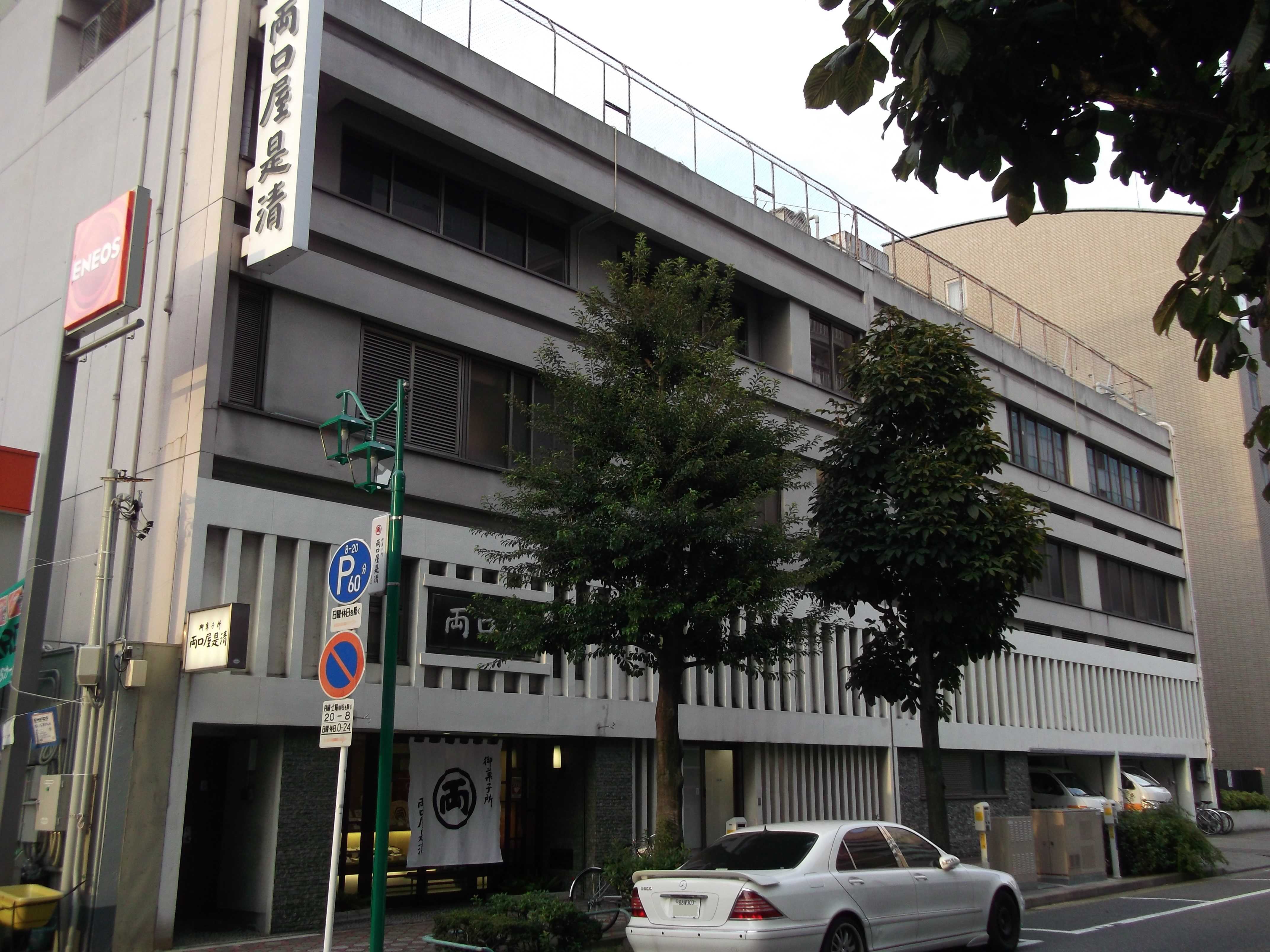 名古屋市中区の両口屋是清本社を南側公道西側より撮影